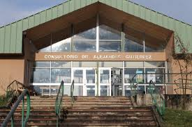 Consultorio Dr. Alejandro Gutierrez